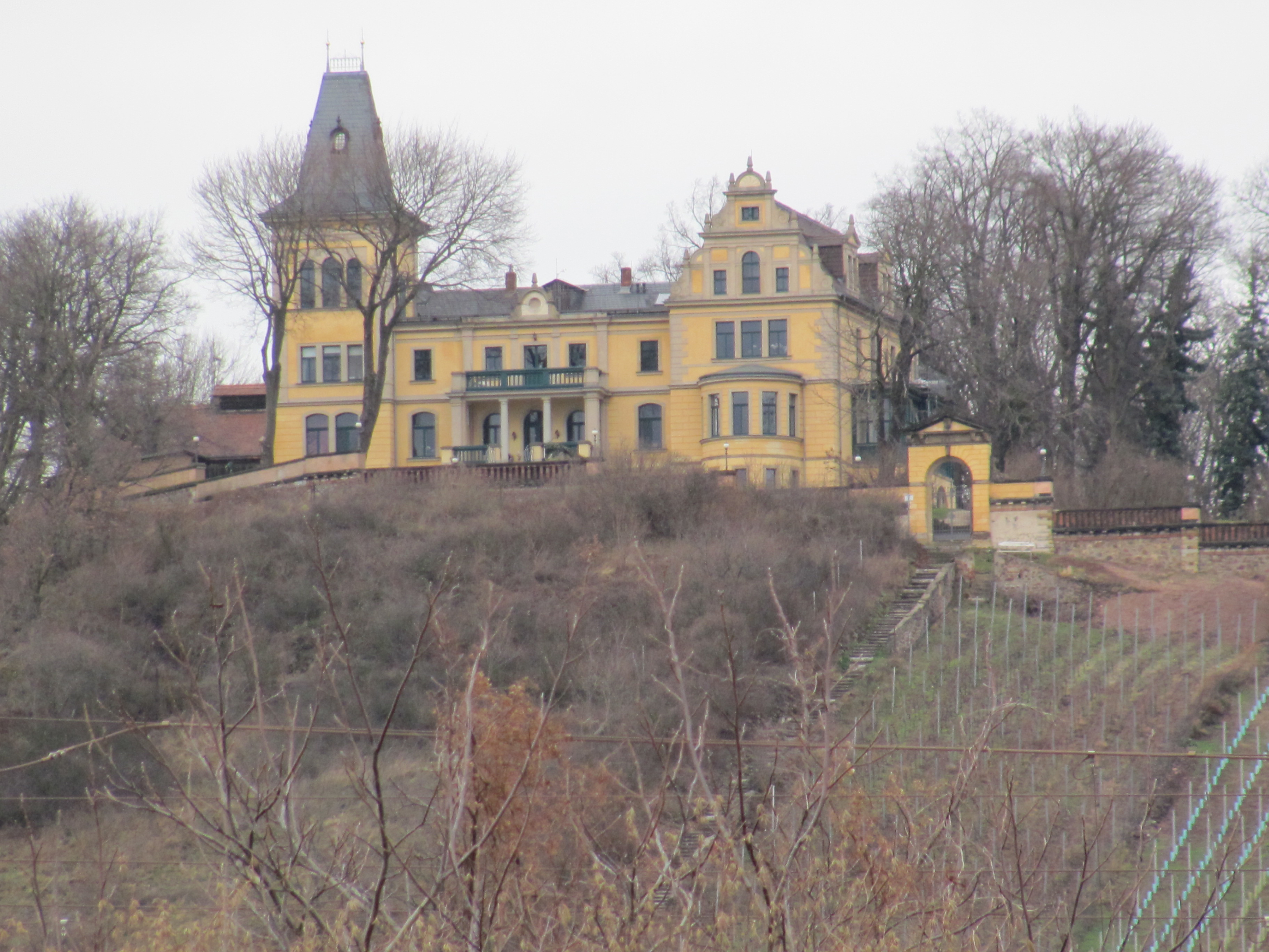 Wettinhöhe (Radebeul), oben das Haus Wettinhöhe